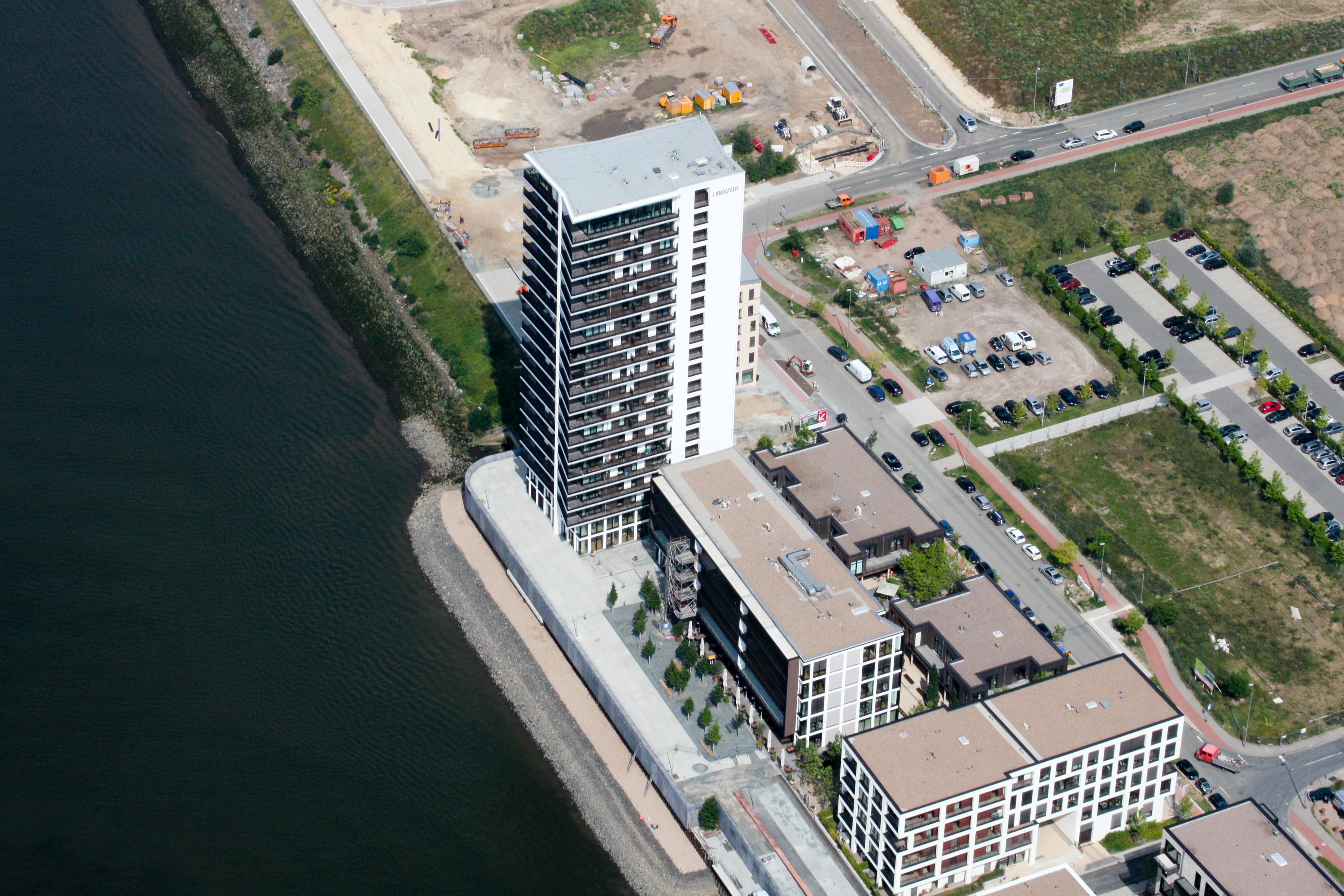 Lufbilder Bremen: Häfen, JVA Oslebshausen, Ohlendorf, Lindenhof, Überseestadt, Becks, Kellogs, St. Stephanis Kirche, Hauptbahnhof, Weser (identische Bildbeschreibung für File:2012-08-08-fotoflug-bremen zweiter flug 1142.JPG bis File:2012-08-08-fotoflug-bremen zweiter flug 1244.JPG; alle mit GPS-Koordinaten